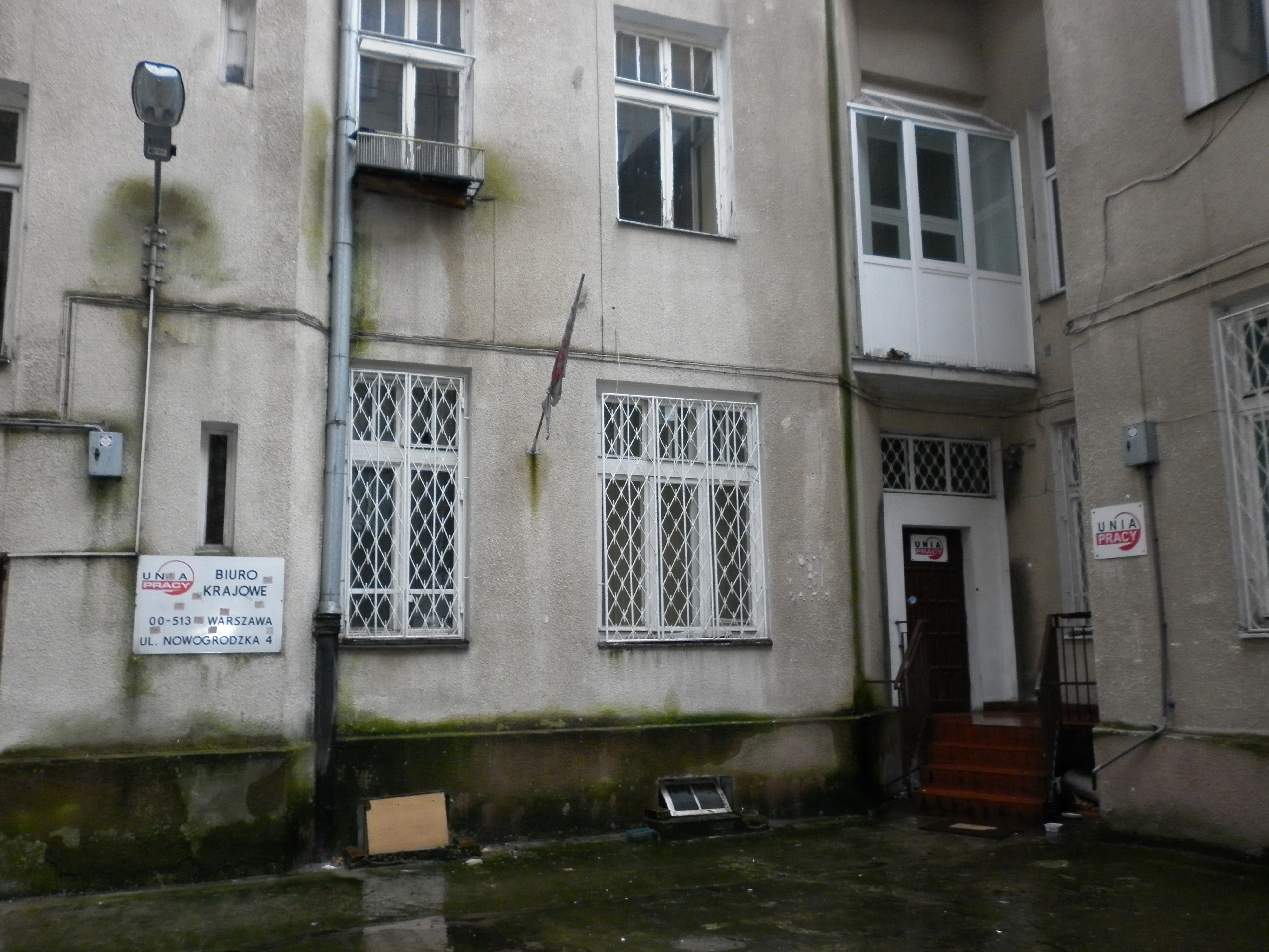 Siedziba Unii Pracy